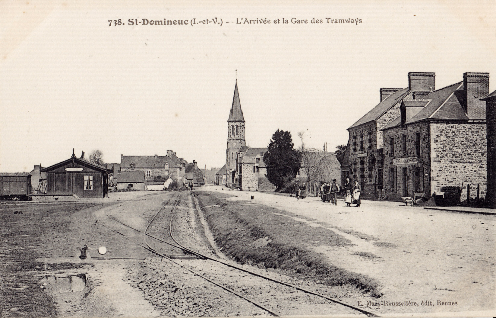 Carte postale ancienne éditée par